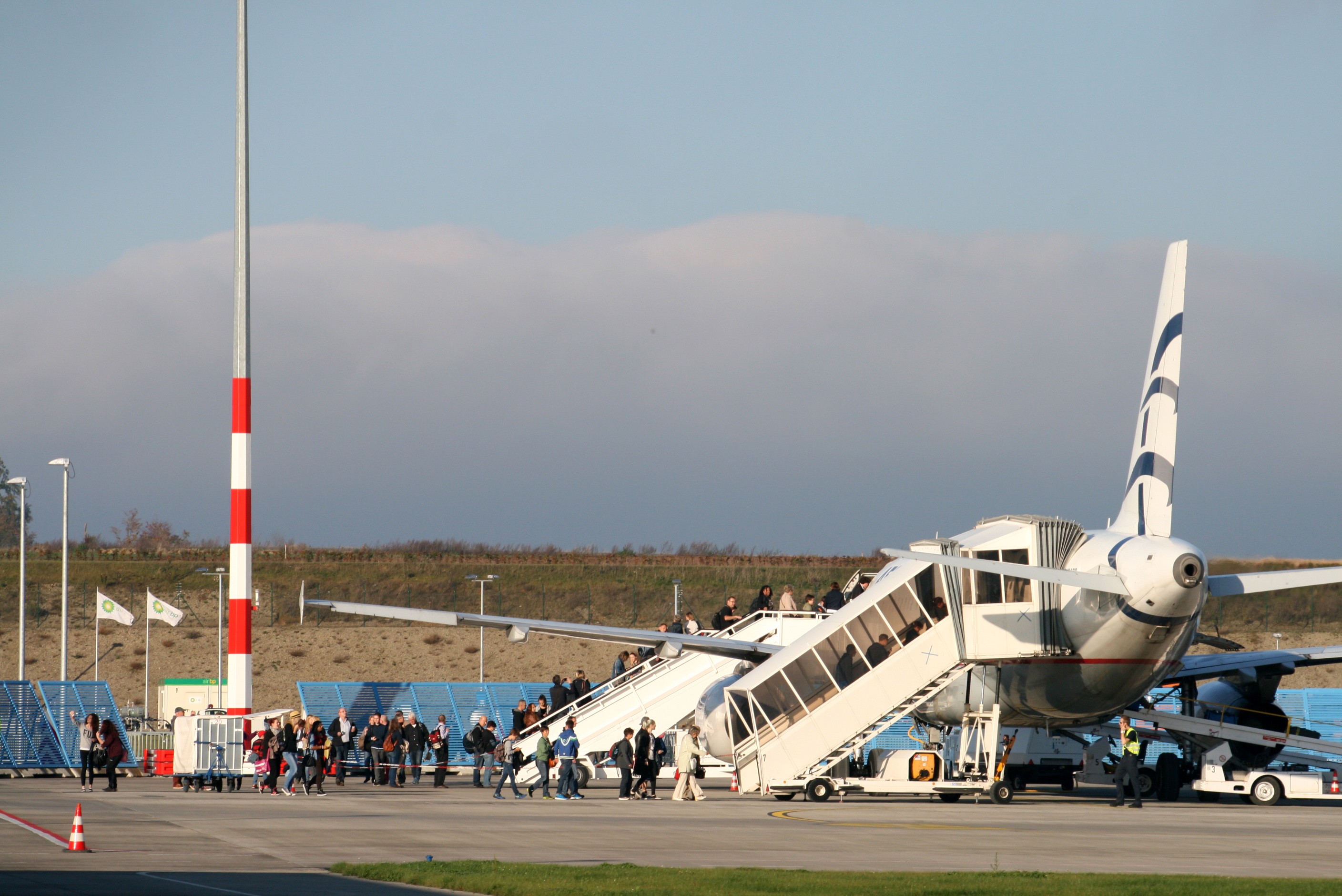 Boarding des "Ethos"-Airbus A320 (SX-DVG) am 19.10.2014 von Aegean Airlines am Flughafen Kassel-Calden KSF zum Flug nach Heraklion/Kreta.